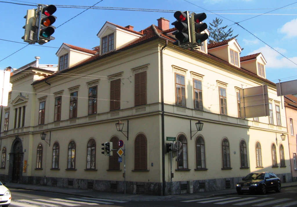 Ehem. Stadtpalais Prokesch-Osten